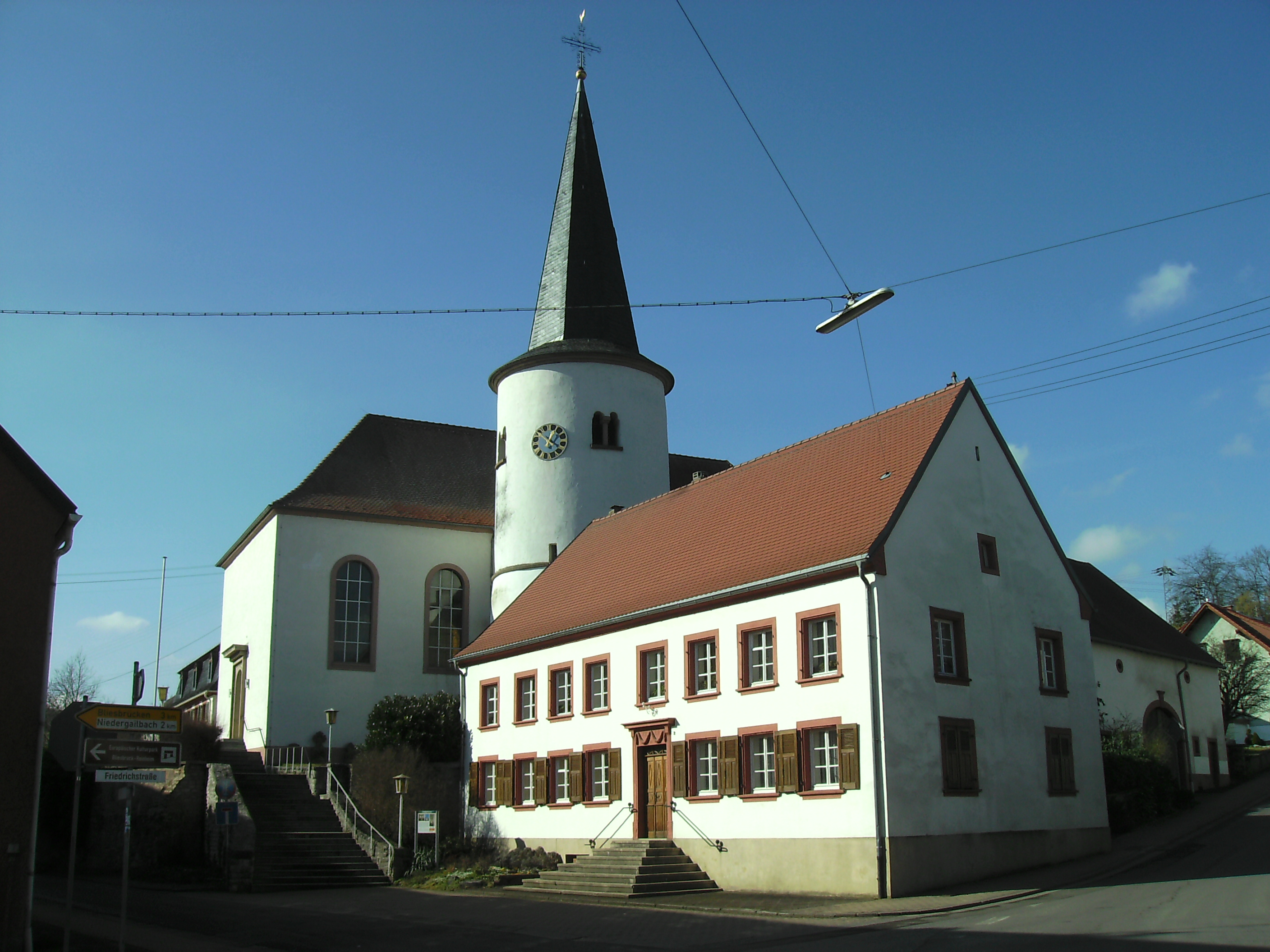 Kirche St. Markus in Hersheim-Reinheim